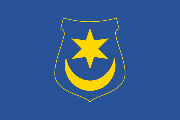 Flaga Tarnowa (miasto w Województwie Małopolskim).